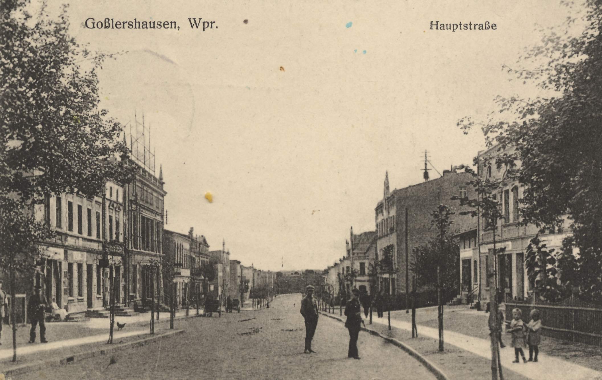 Hauptstraße